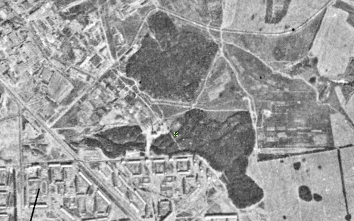 Казань. Горкинский лес и Ометьевский лес